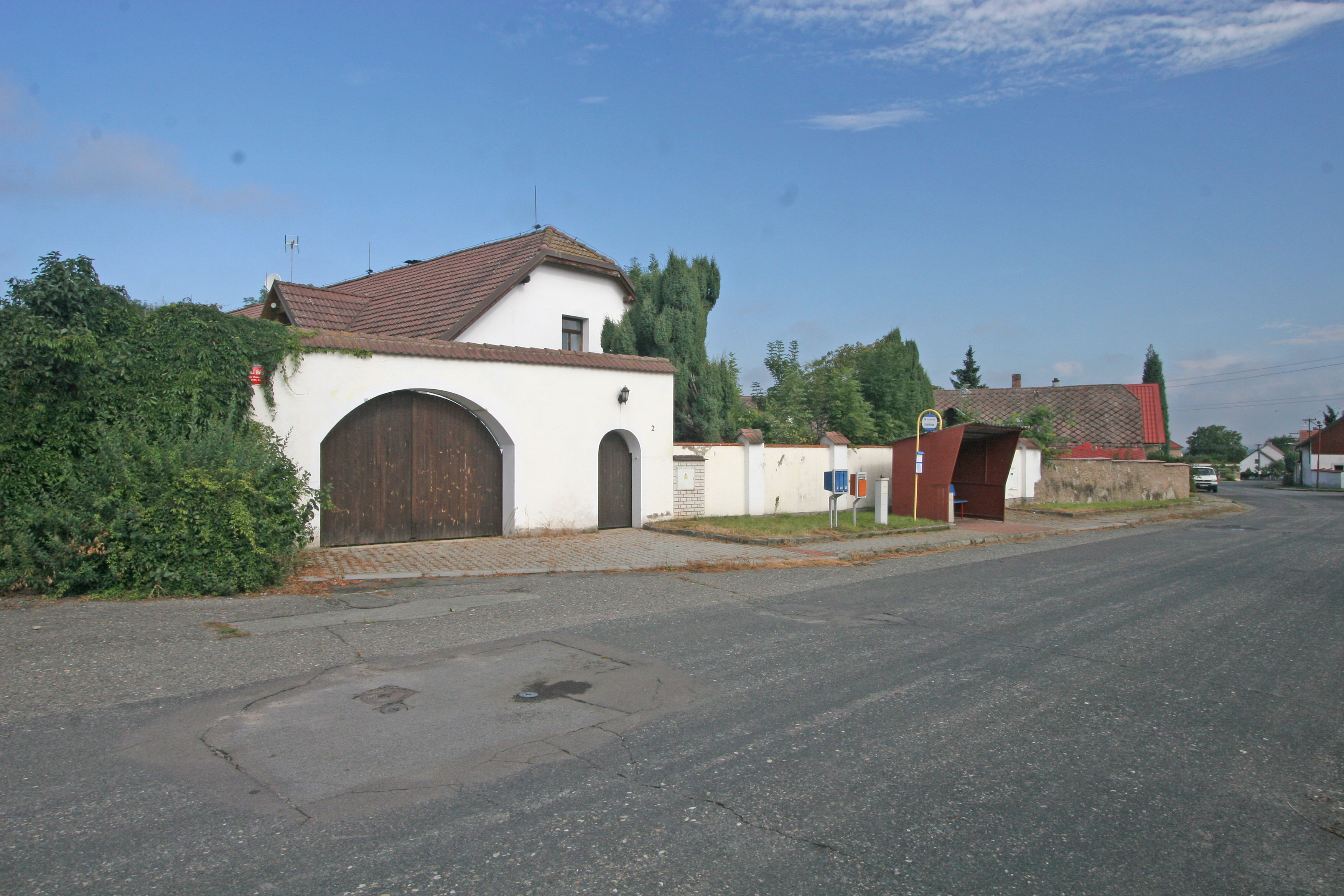 Kozašice čp. 2